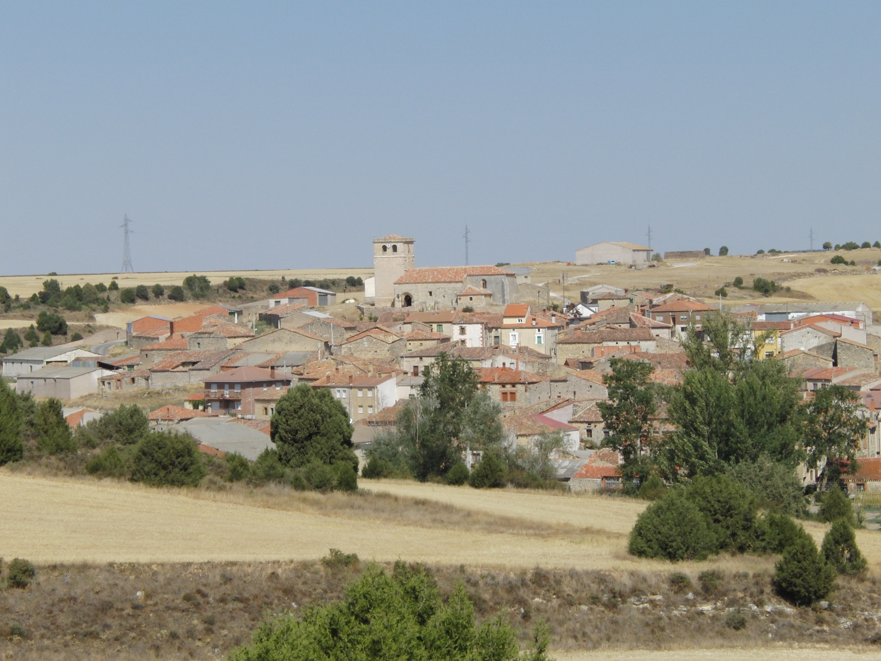 Imagen general del municipio de Pineda Trasmonte (Burgos, España)